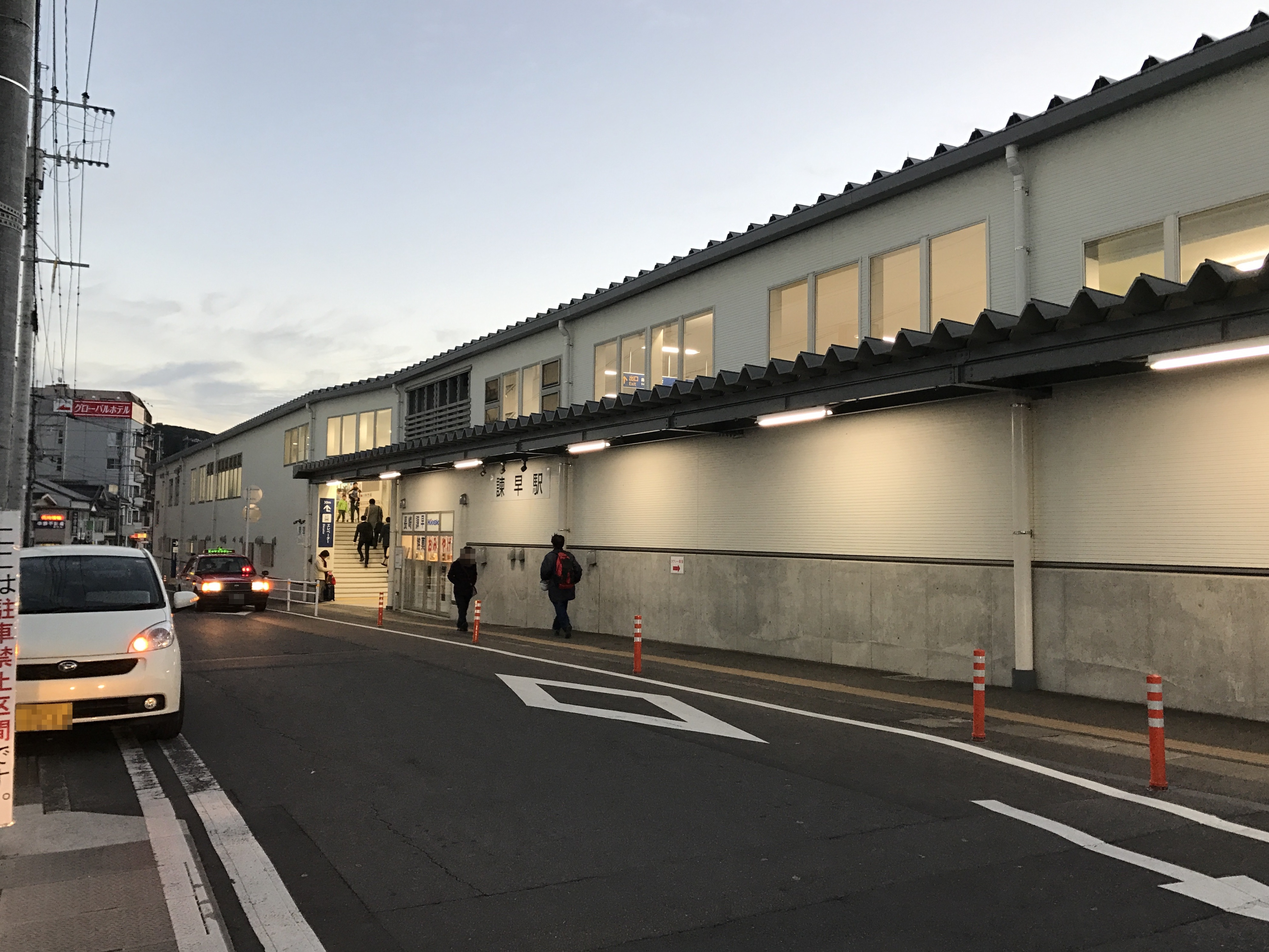 諫早駅の仮駅舎